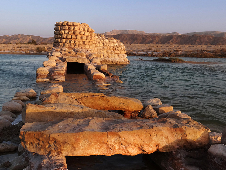 بنای ترنه (ترنو)